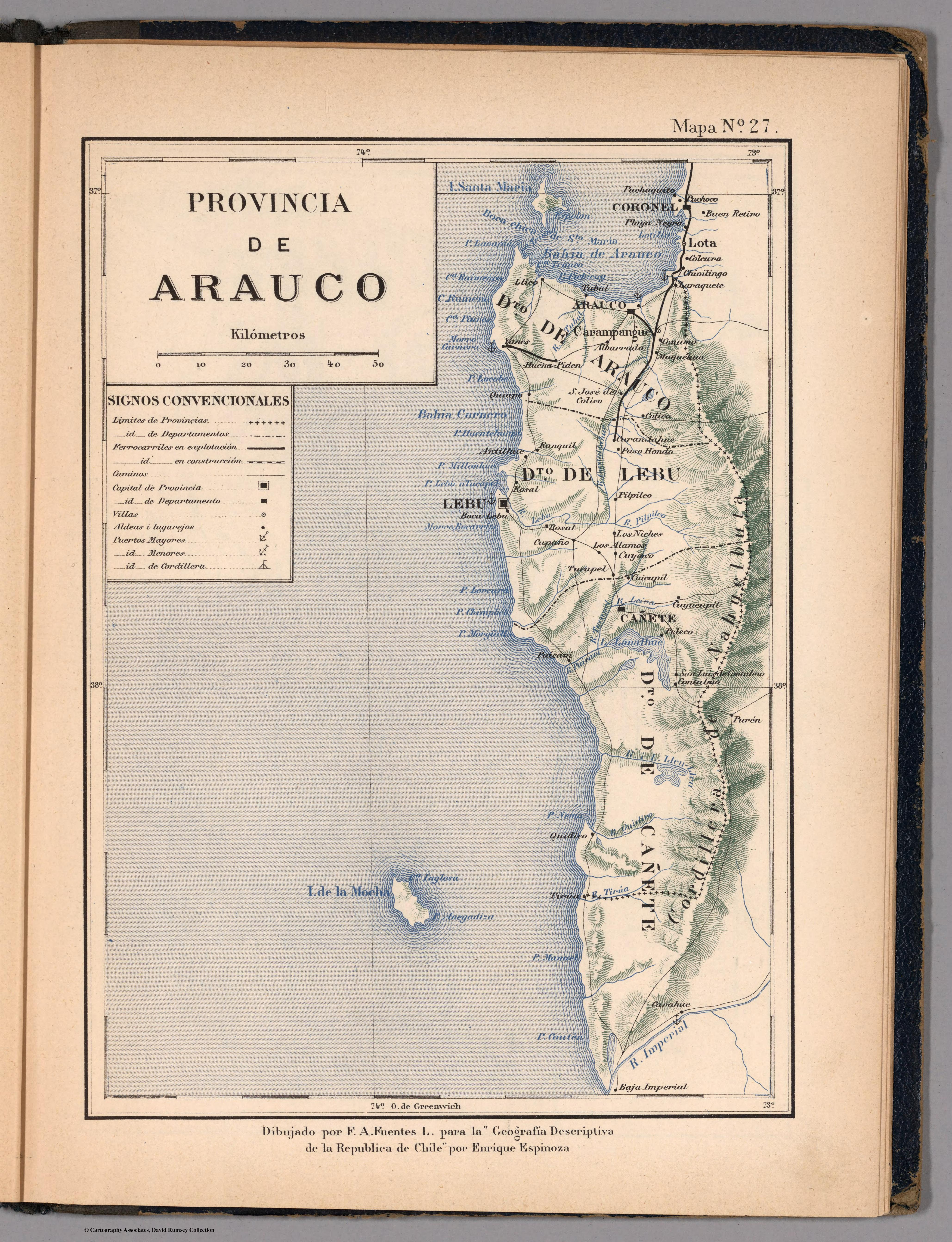 Atlas de Chile Arreglado para la Jeografia Descriptiva de la Republica de Chile por Enrique Espinoza.